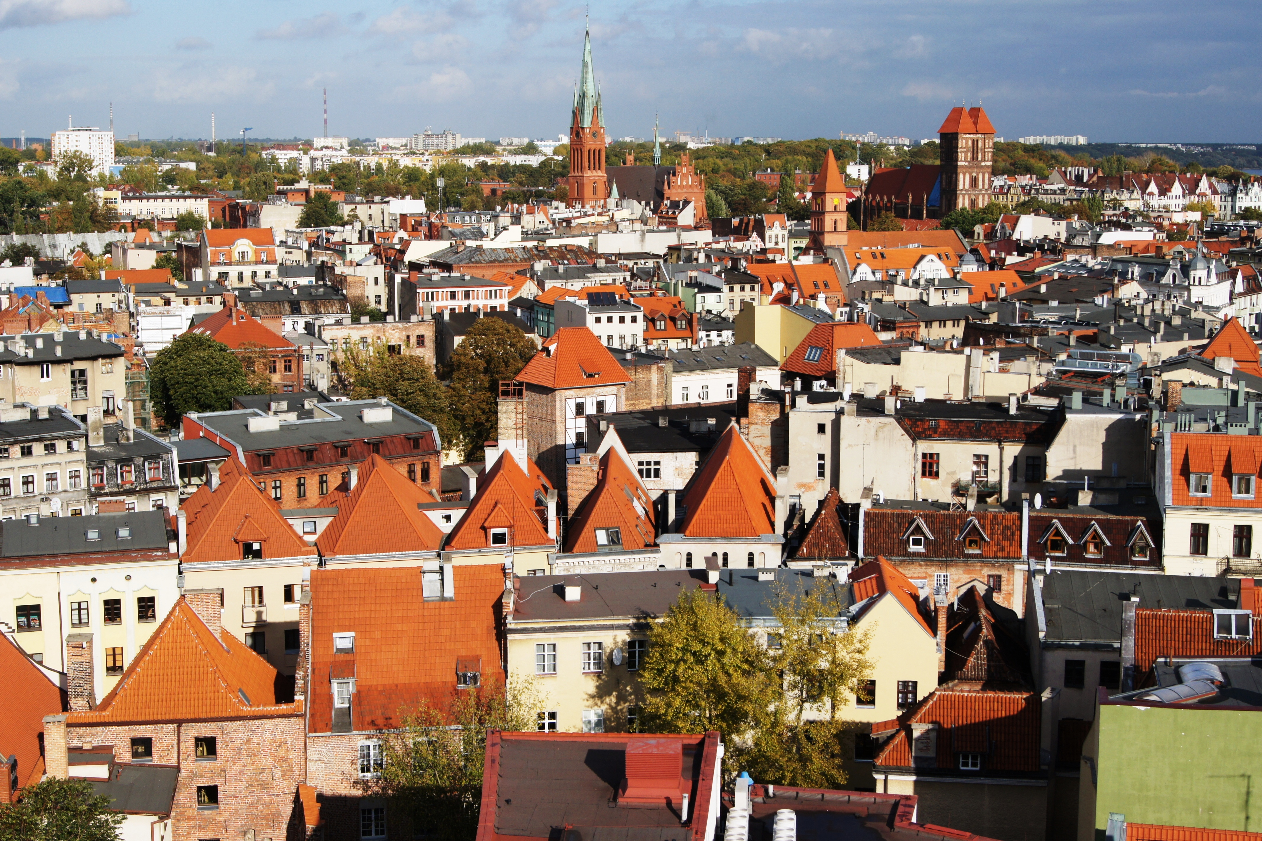 Toruń zespół dzielnicy staromiejskiej (zabytek nr A/275/244)